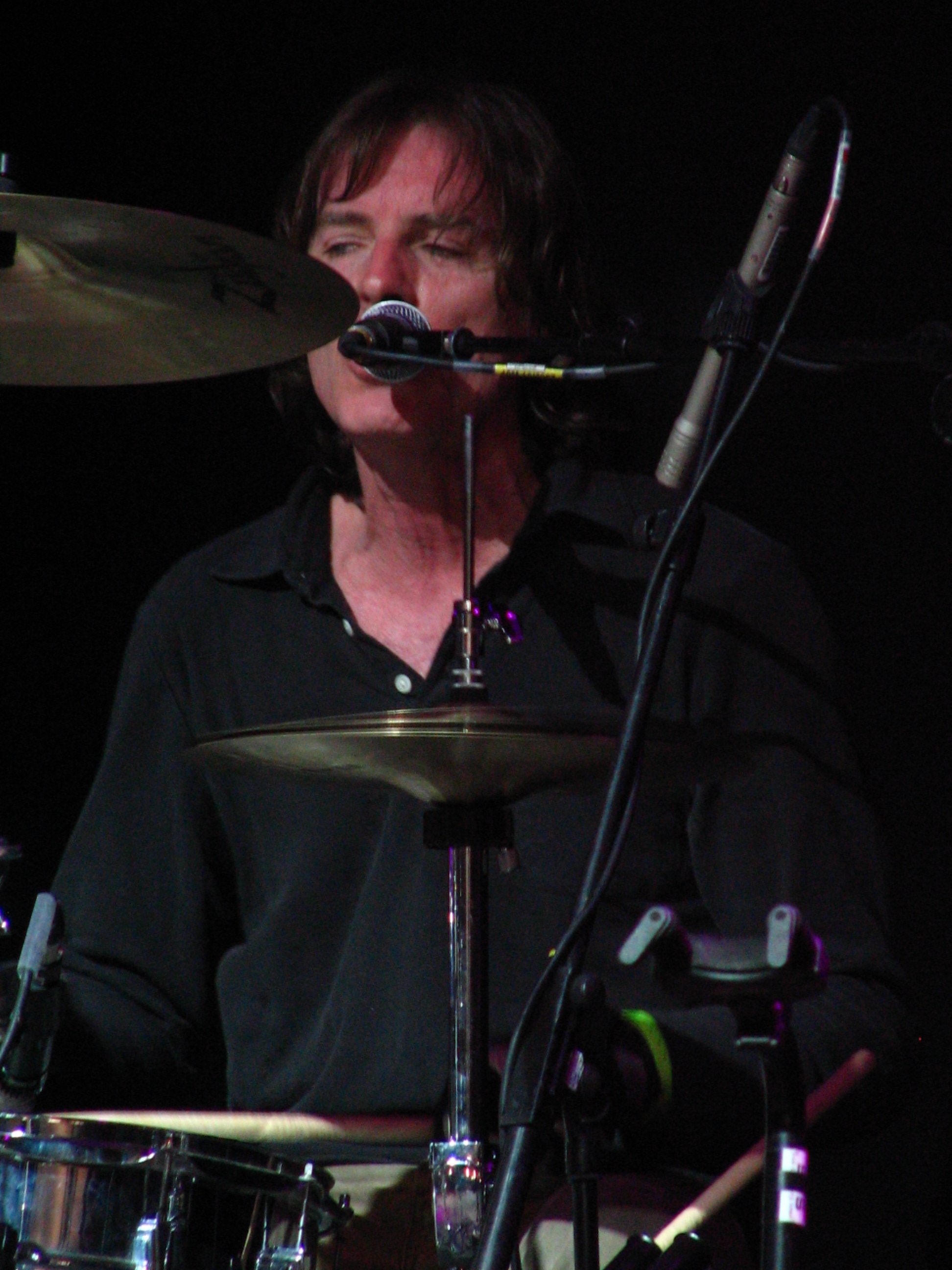 Big Star on stage at Hyde Park, London, UK